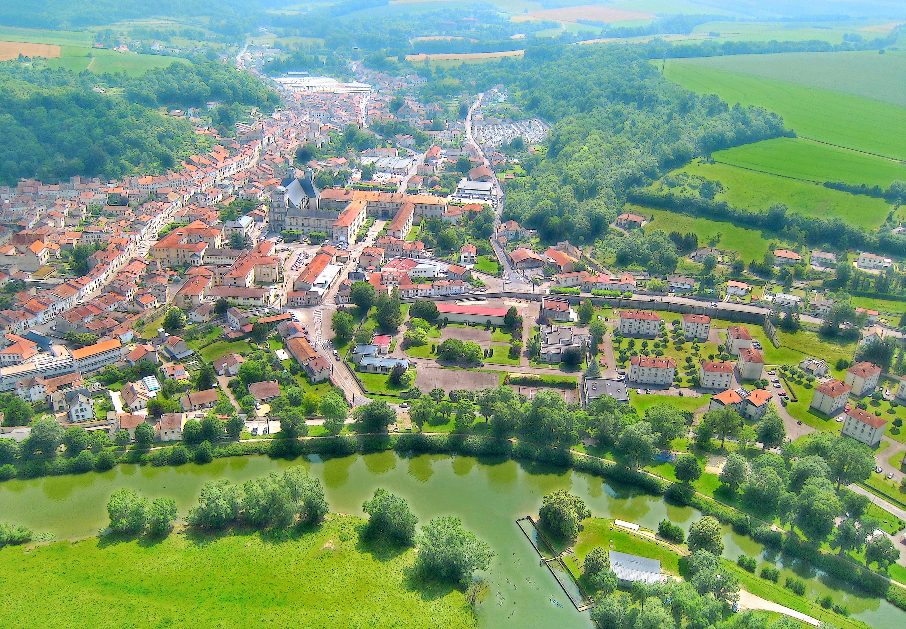 Quartier de l Abbatiale St Michel depuis le bain de soldats